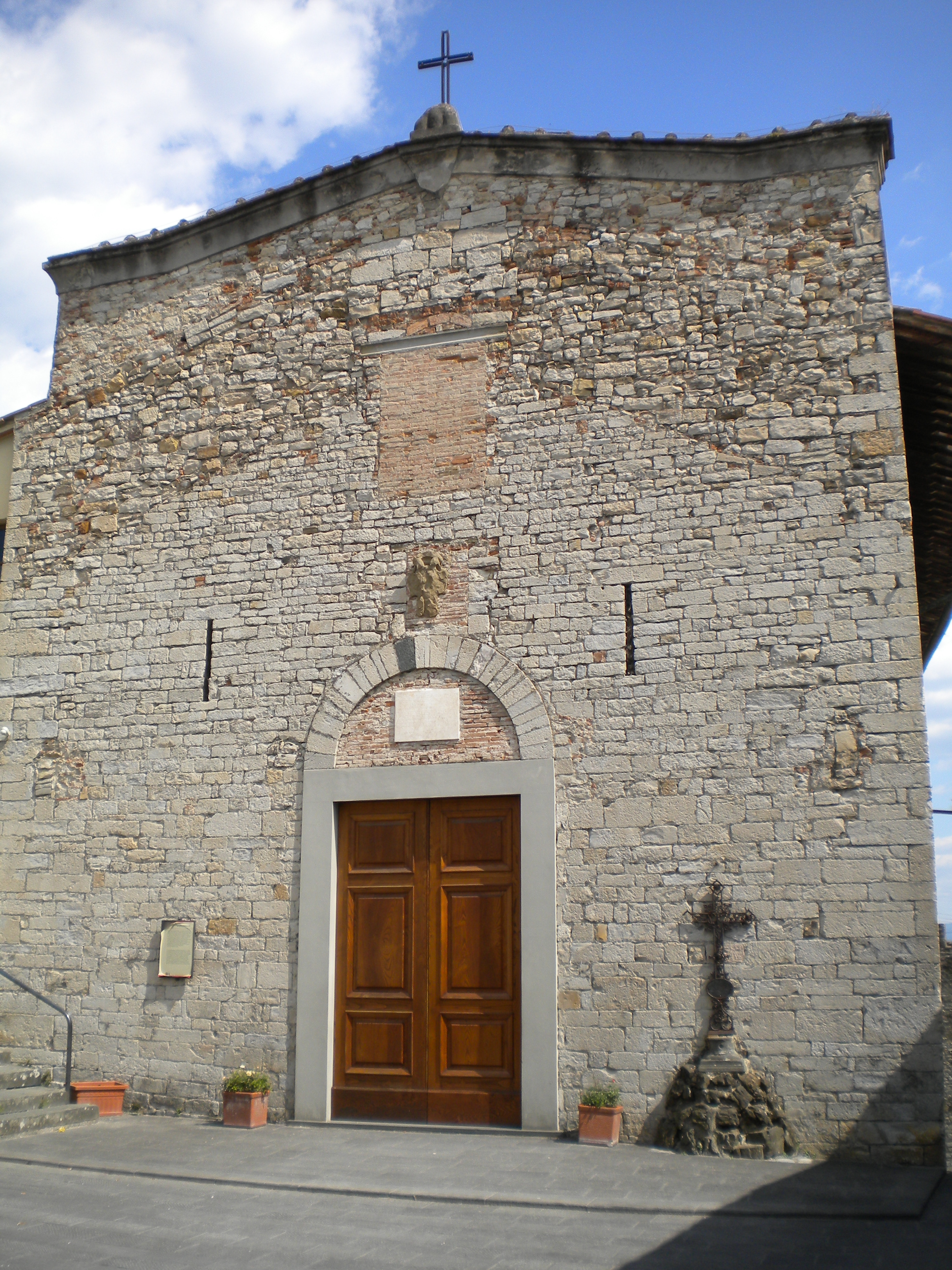 san niccolo'